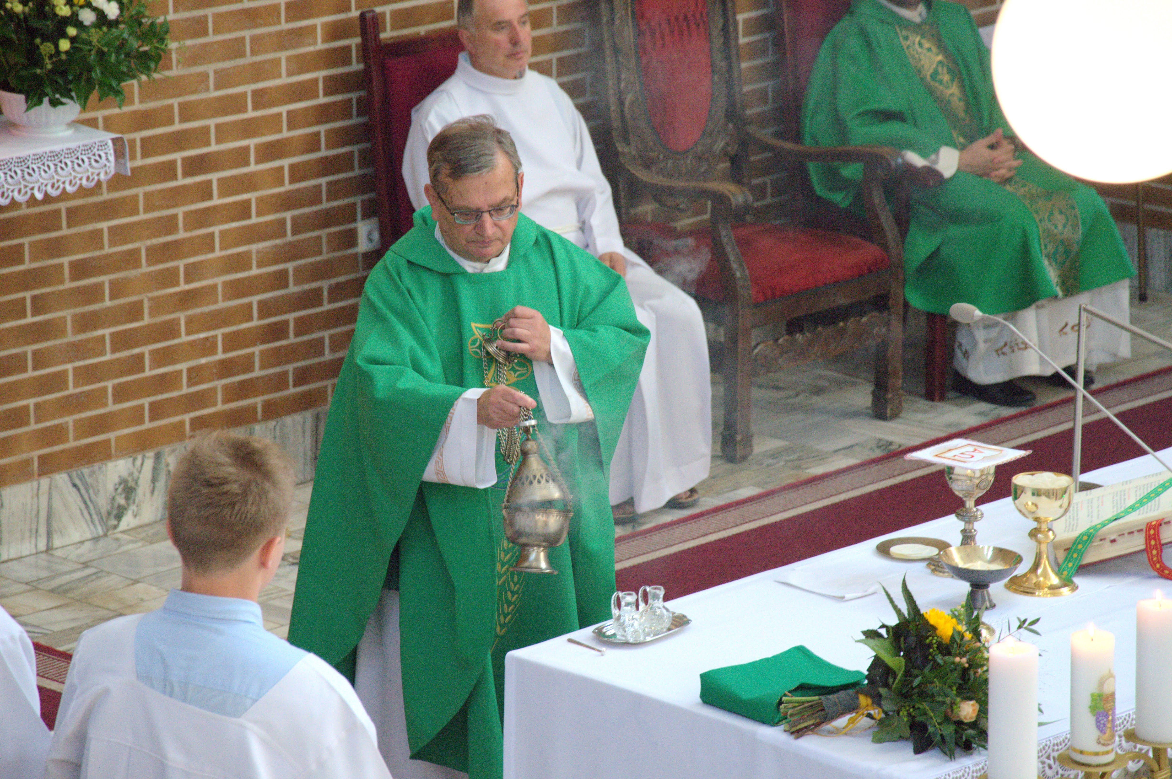 Proboszcz Alfred Michalik podczas ostatniej mszy św. z wiernymi w dniu 12.08.2018 r.